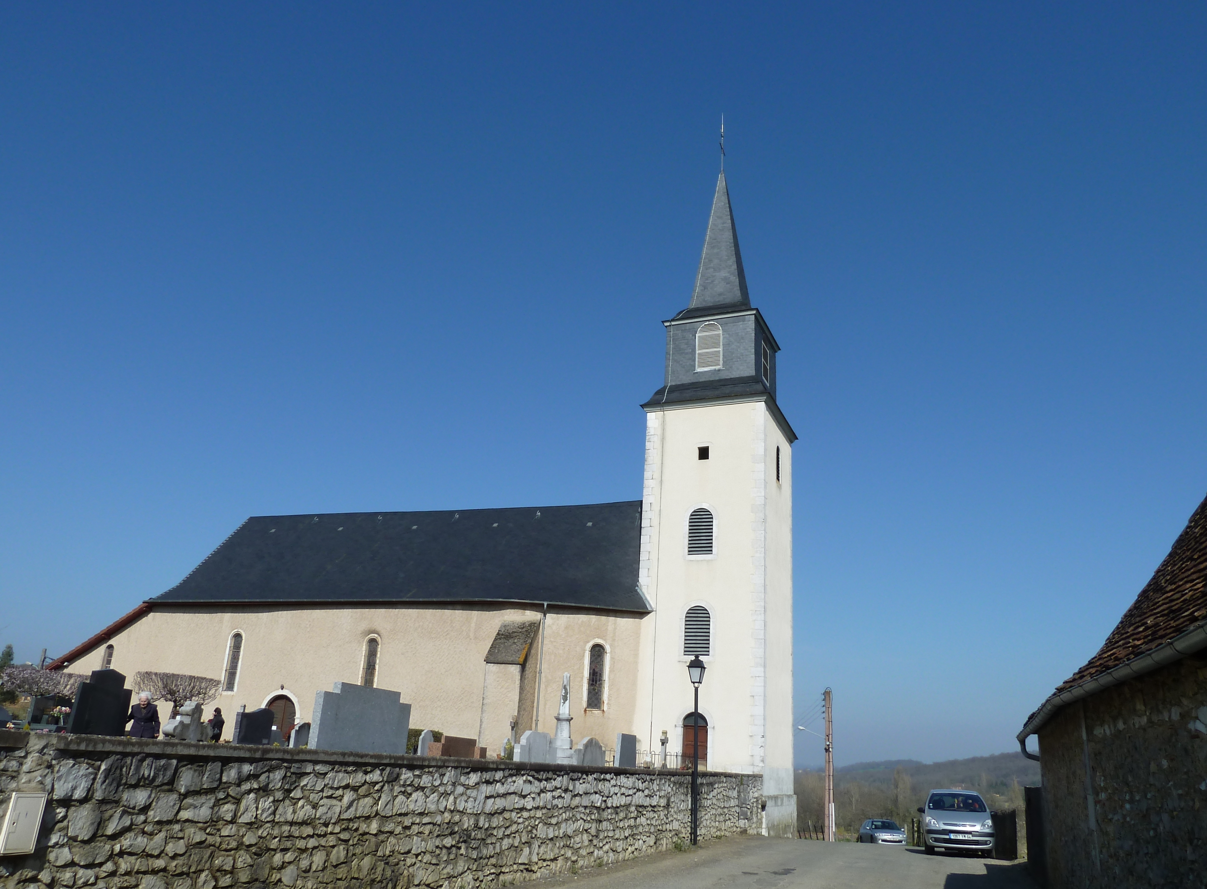 Église de Loubieng